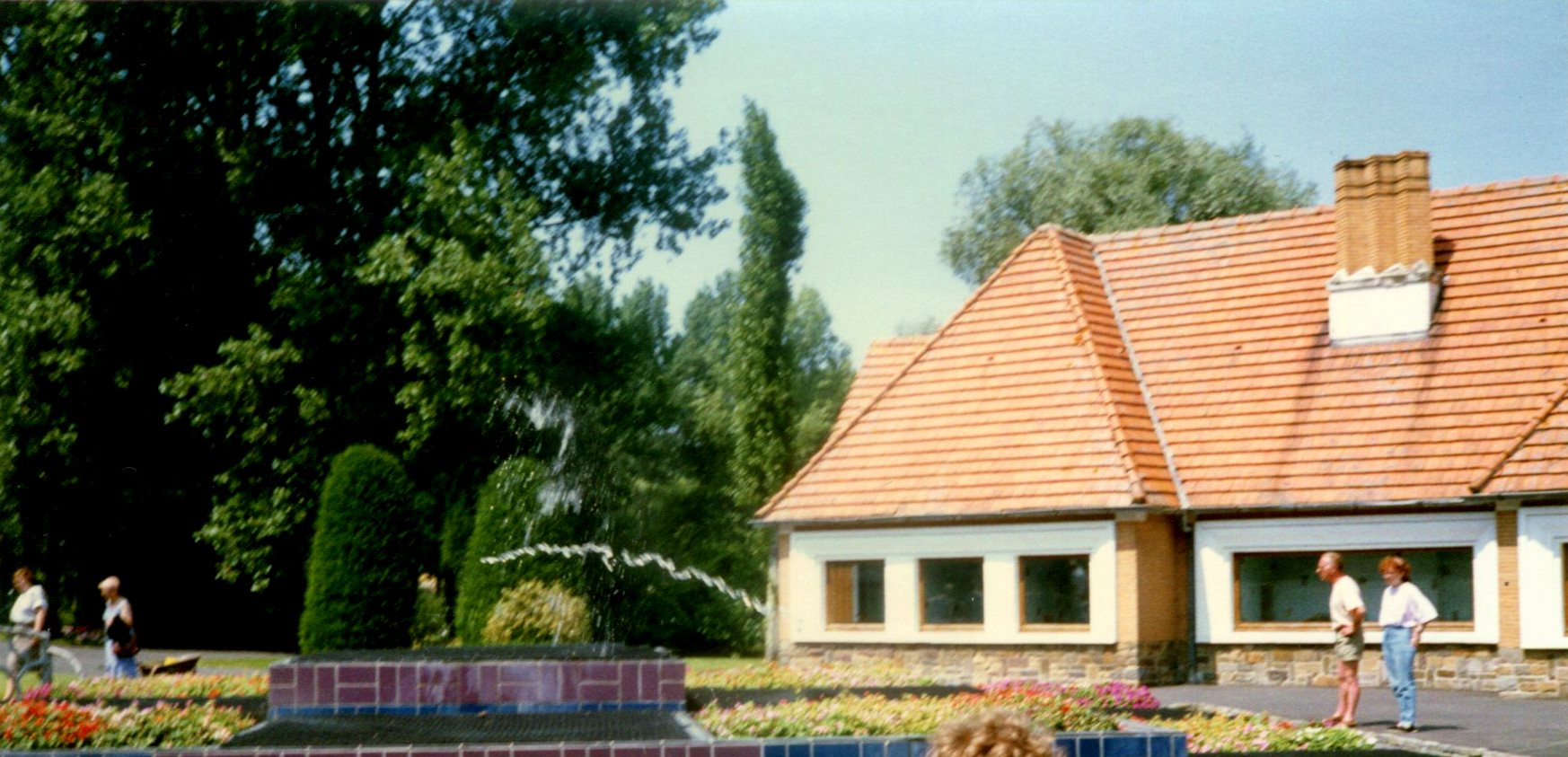 MeliparkJardin